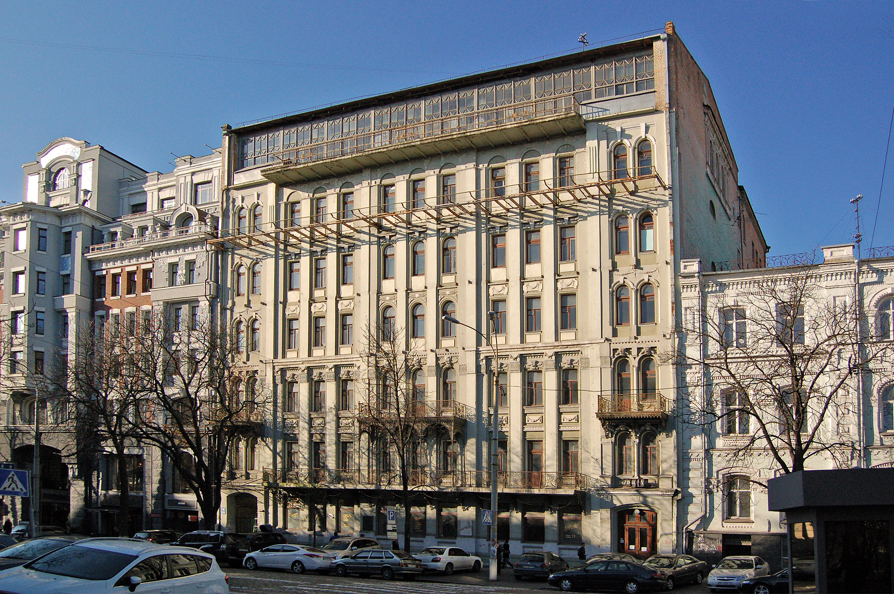 Будинок № 36 по Володимирській вулиці у Києві